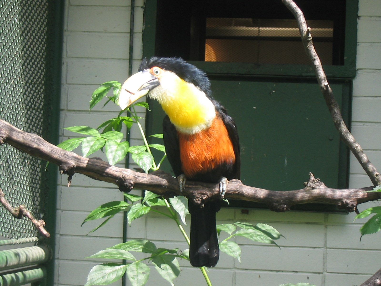 Ramphastos dicolorus Zoo Bojnice, Slovakia, 2006